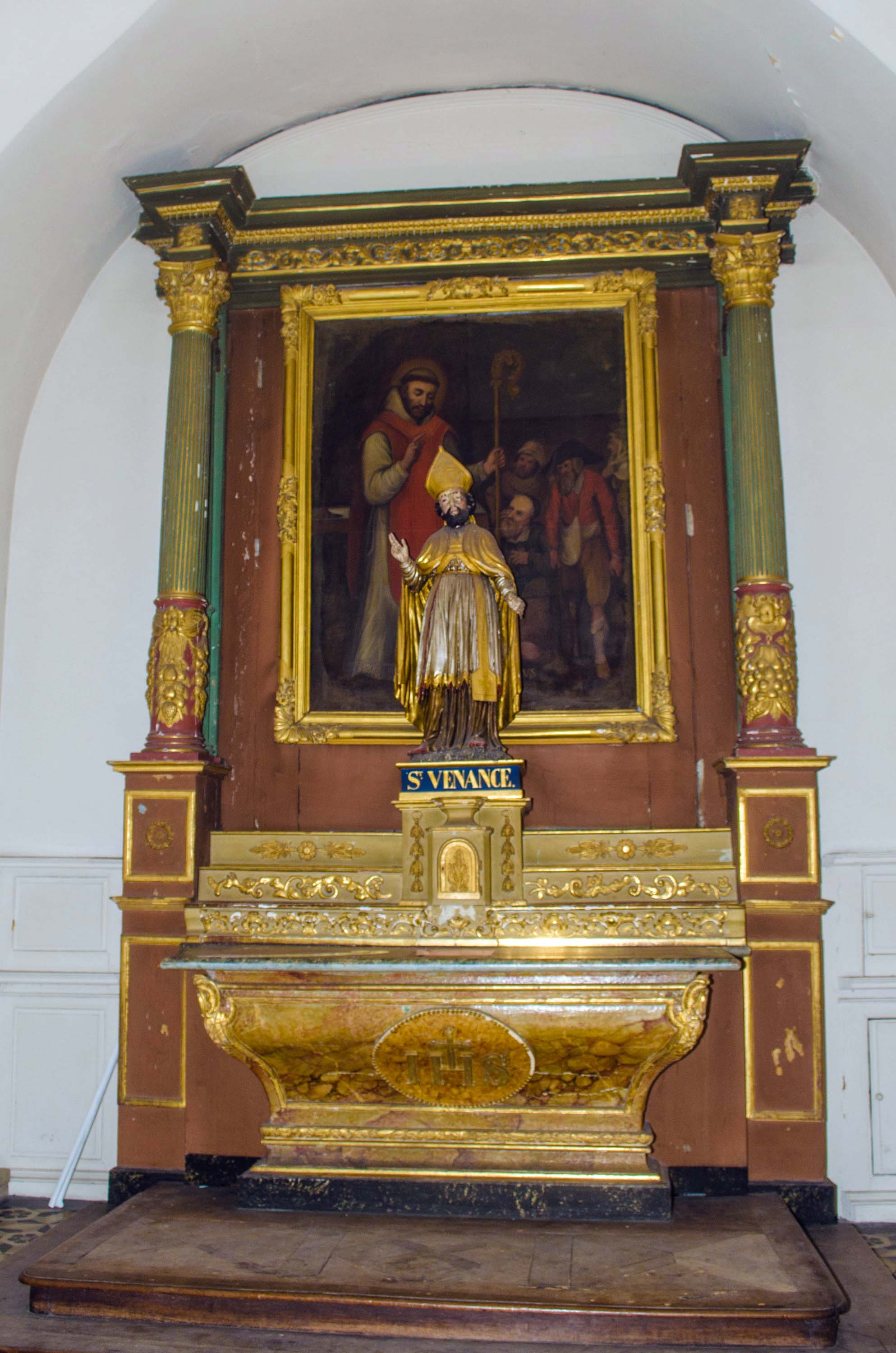 Valence (Drôme), chapelle des Capucins, retable de saint Benoit (peinture) et statue de saint Venance